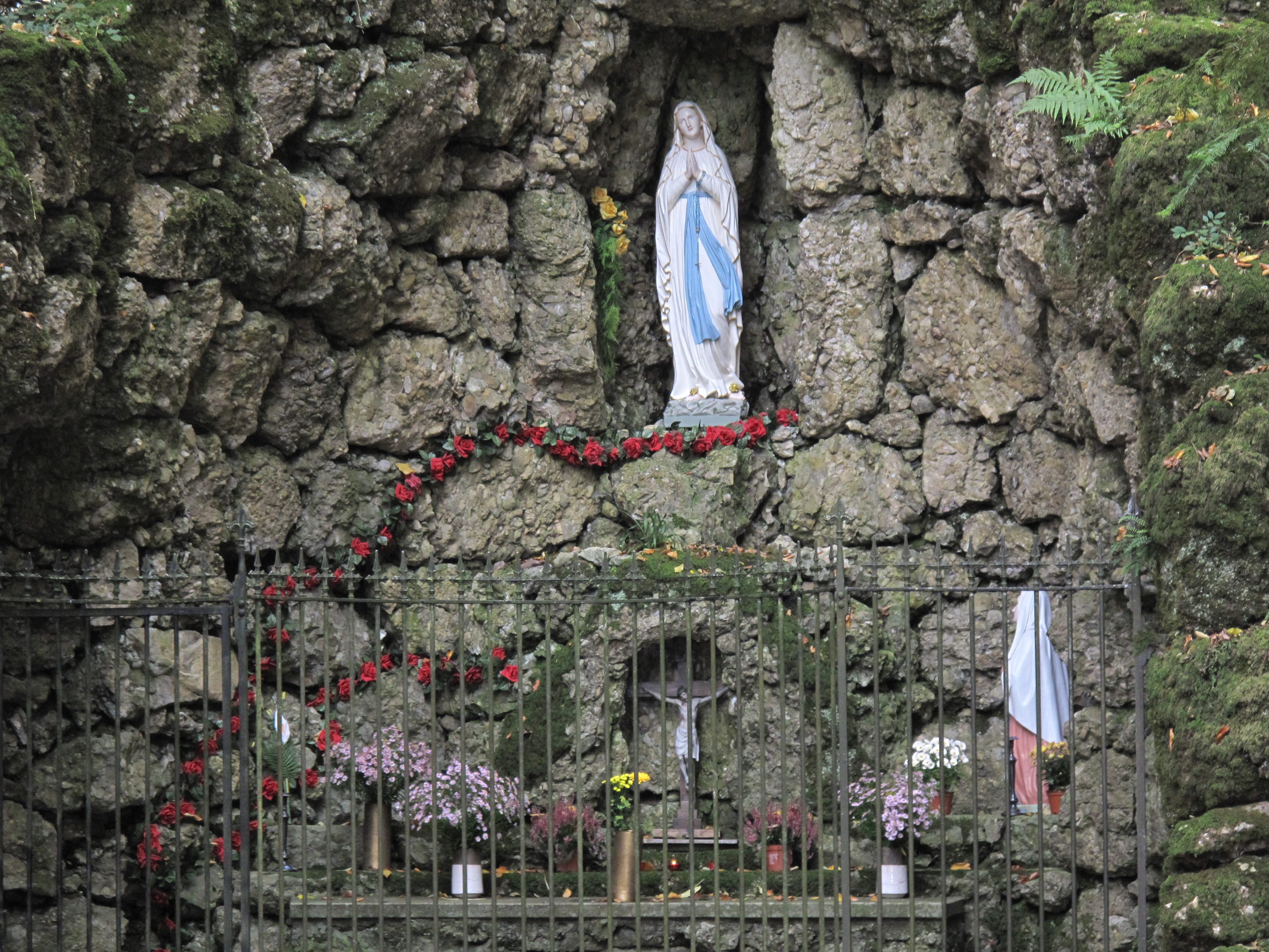 Wallfahrtsort Benken